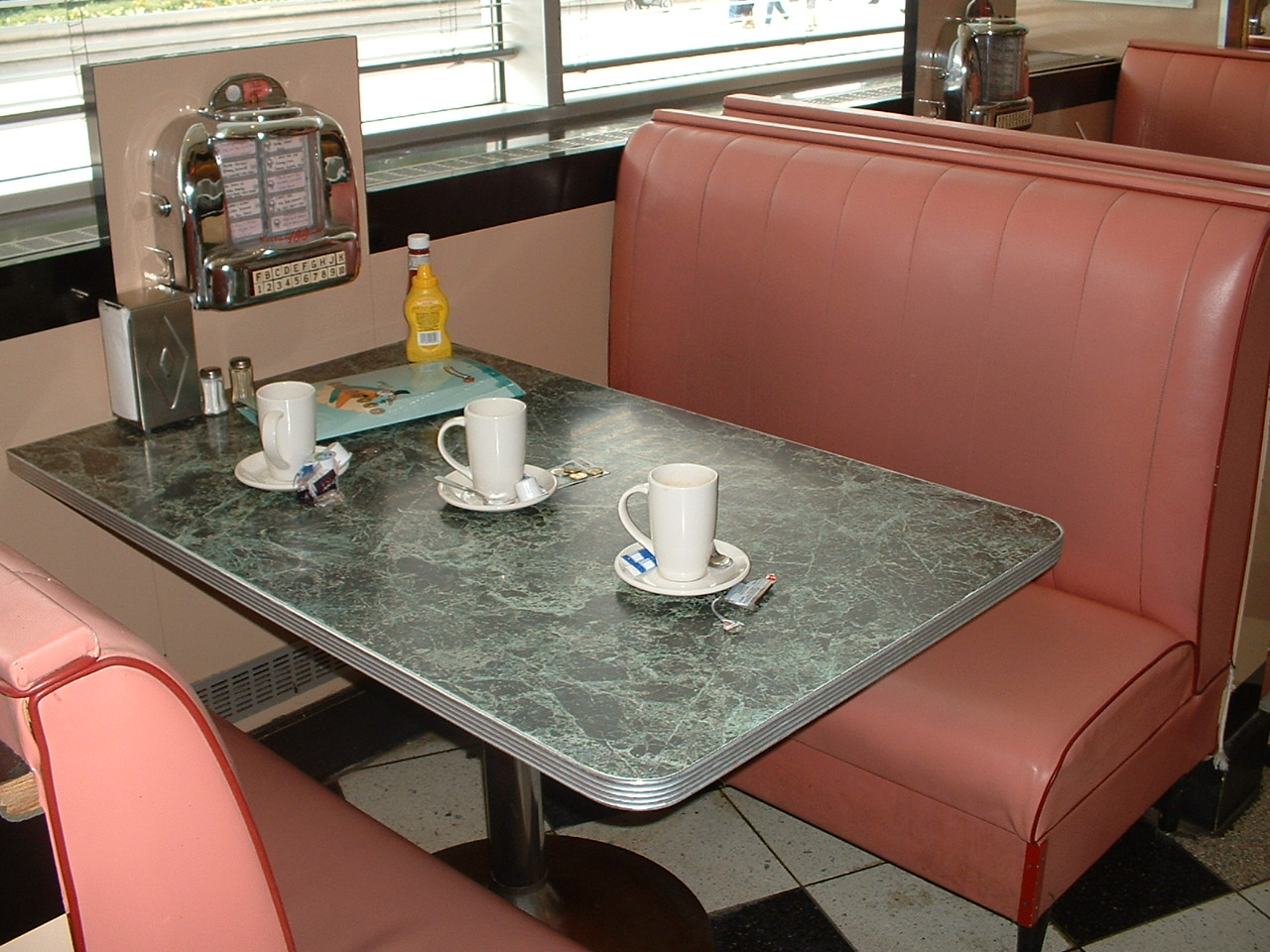 Les tables (qui respectent fidèlement les année 50) du restaurant Annette's Diner, Disney Village, France. La décoration ressemble fortement à la série T.V Happy Days